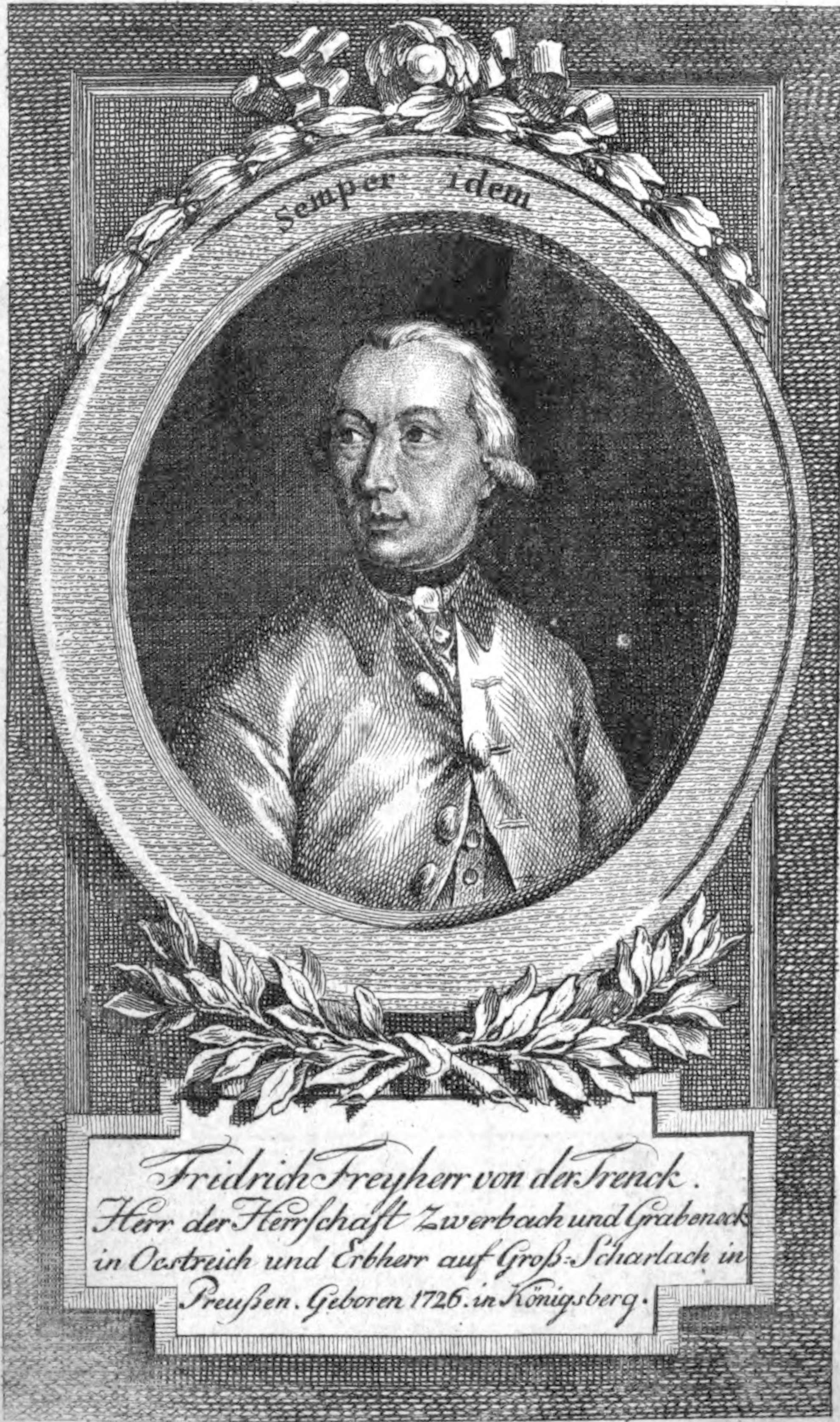 Porträt: Friedrich von der Trenck (1727-1794). Aus: Des Freyherrn Friedrichs von der Trenck merkwürdige Lebensgeschichte. Erster Theil. Georg Emanuel Beer, Leipzig 1787